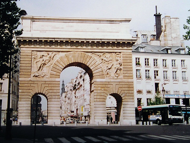 Pierre Bullet: Porte Saint-Martin (1674), Paris, vue du sud, bas-reliefs allégoriques La rupture de la Triple Alliance par Étienne Le Hongre (gauche) et La prise de Besançon par Martin van den Bogaert, dit Martin Desjardins (droite). Au fond rue du Faubourg-Saint-Martin avec le clocher de la mairie d'arrondissement.